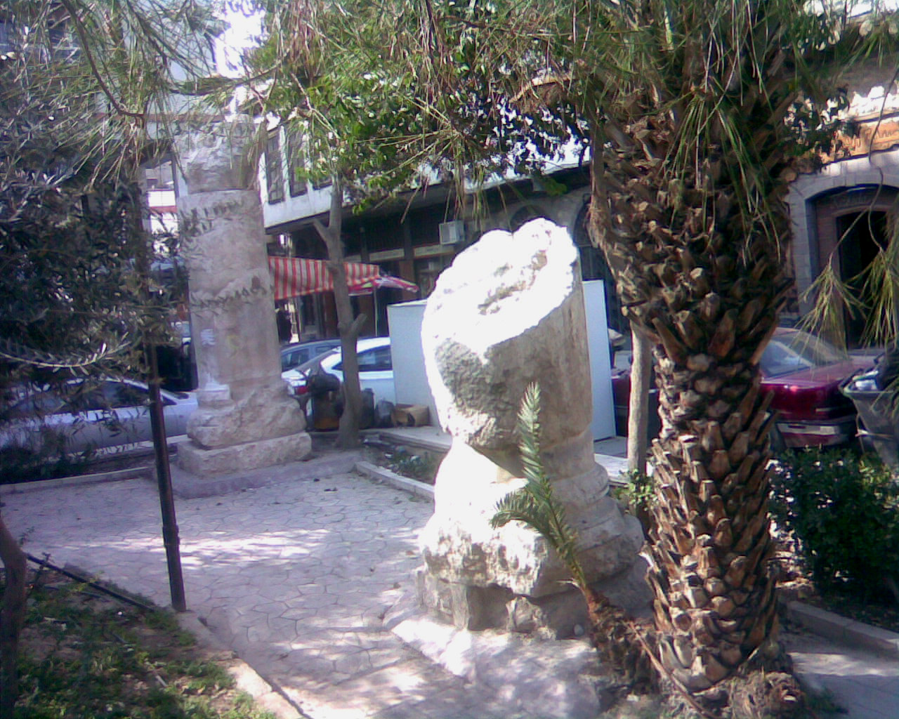 أعمدة الشارع المستقيم في دمشق القديمة